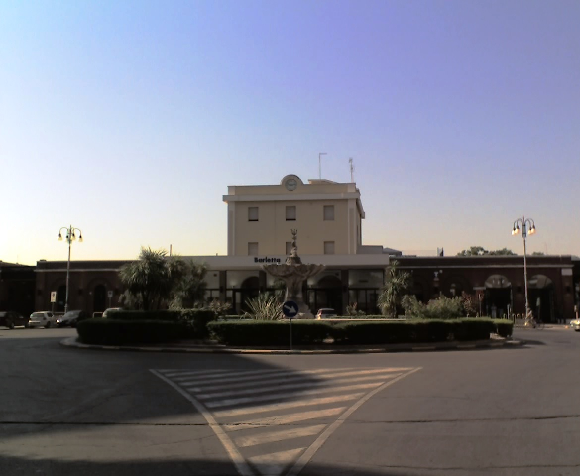 La fontana del piazzale antistante il fabbricato viaggiatori della stazione di Barletta